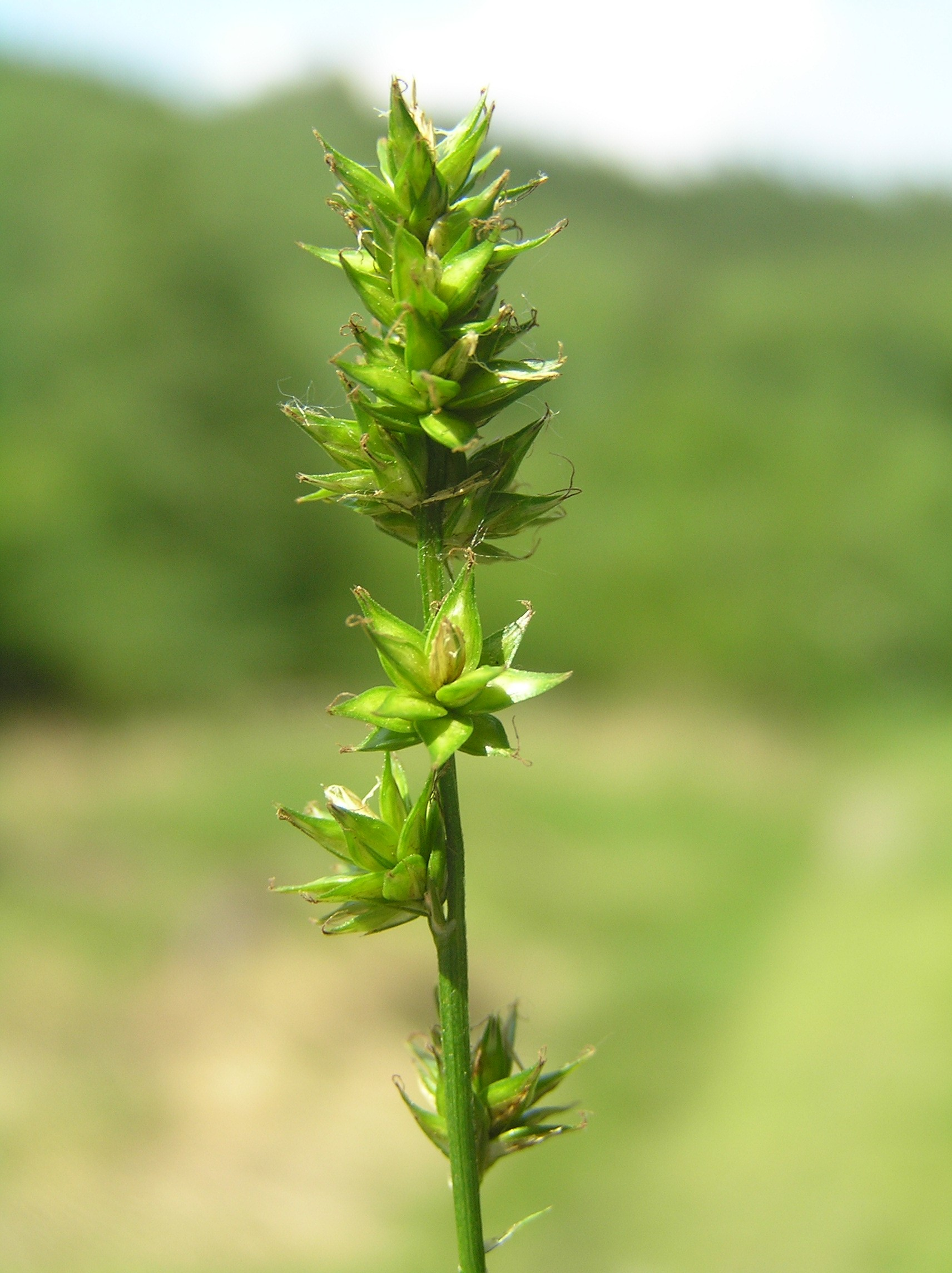 Carex chaberii, Týn nad Bečvou, Czech Republic